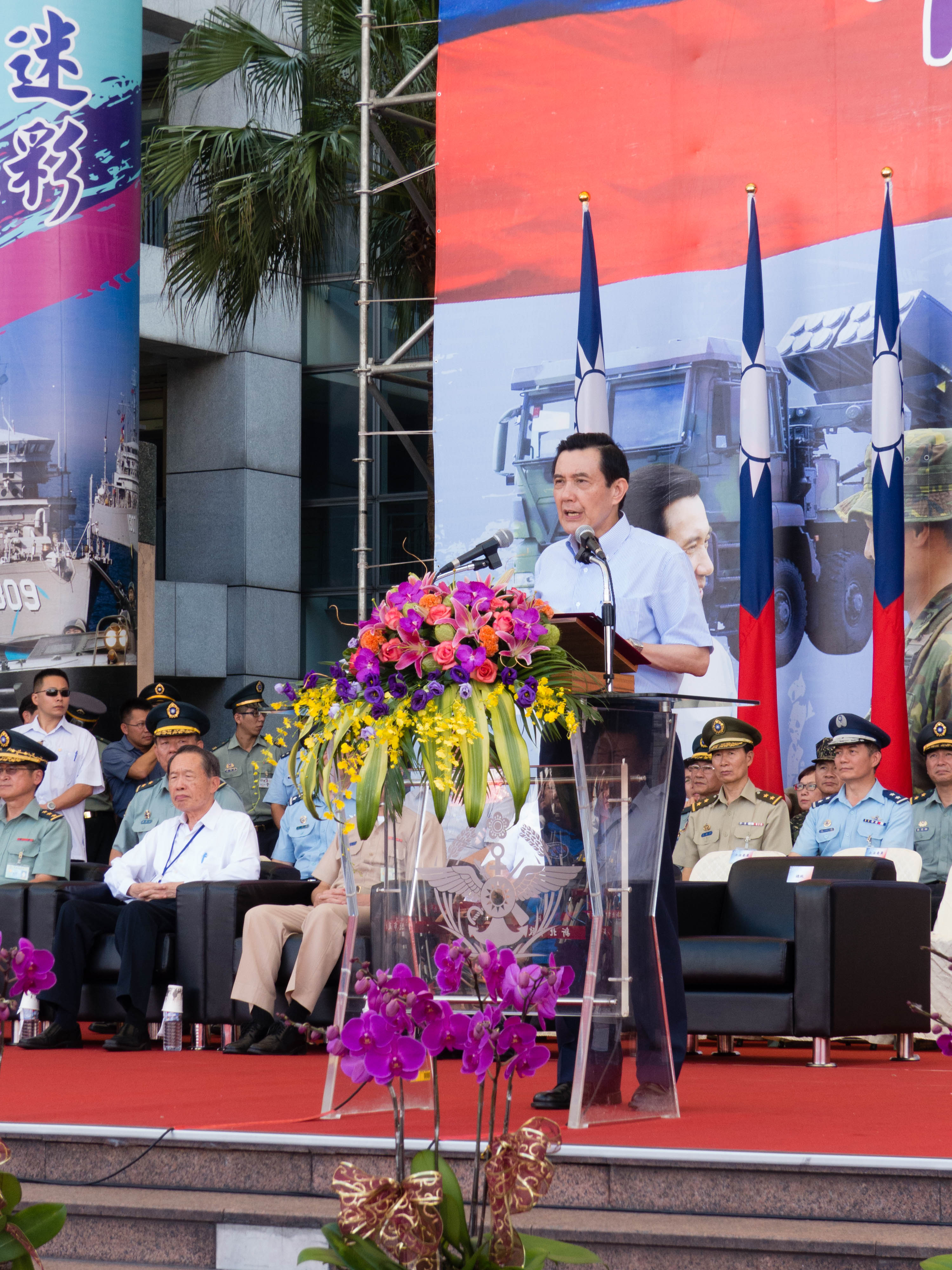 國軍人才招募新北市宣導活動，致辭中的馬總統與司令臺遠景。